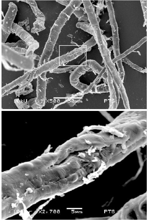 ERM Bild einer untraschall-behandelten, schwachfibrillierten Flachsfaser SETRALIT